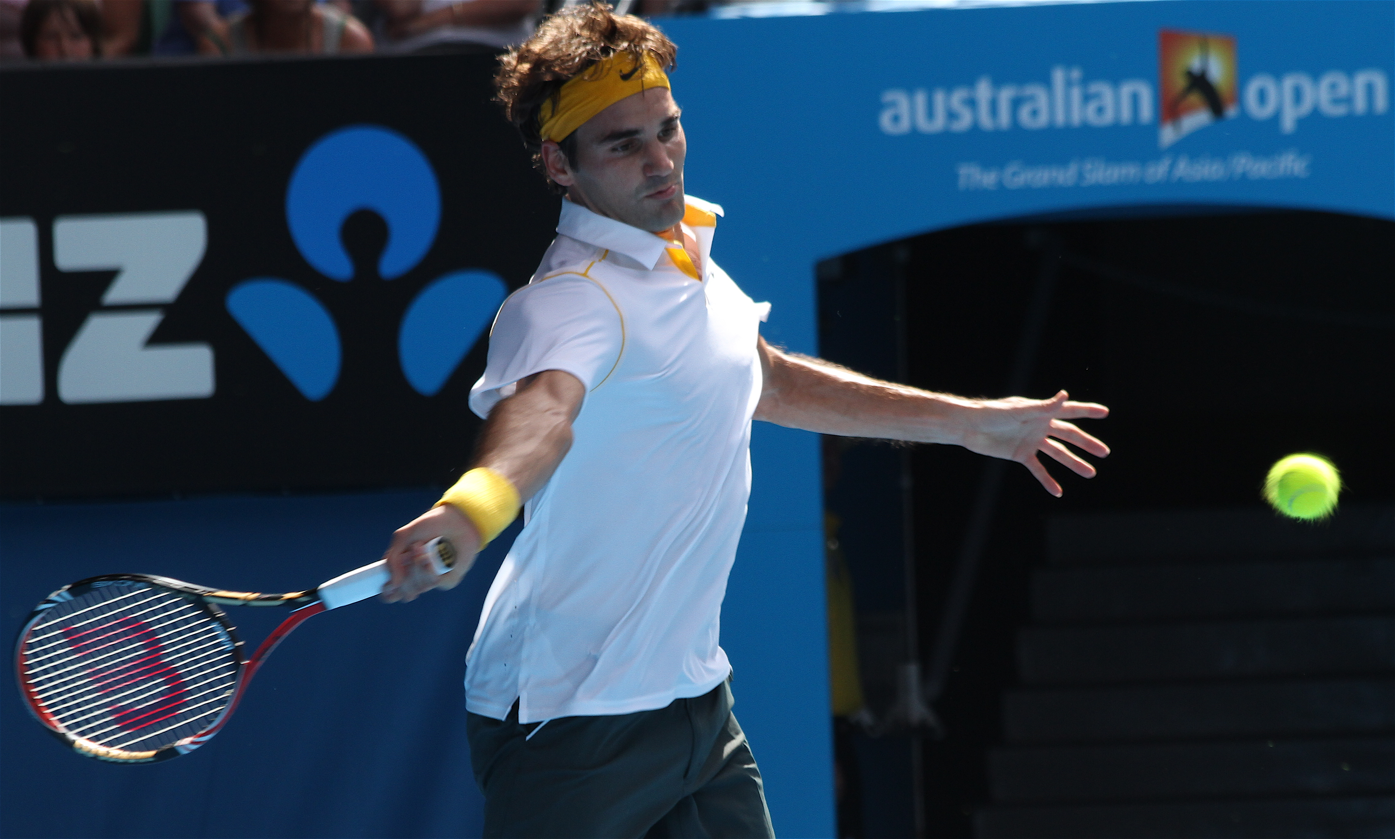 IMG_6090_2